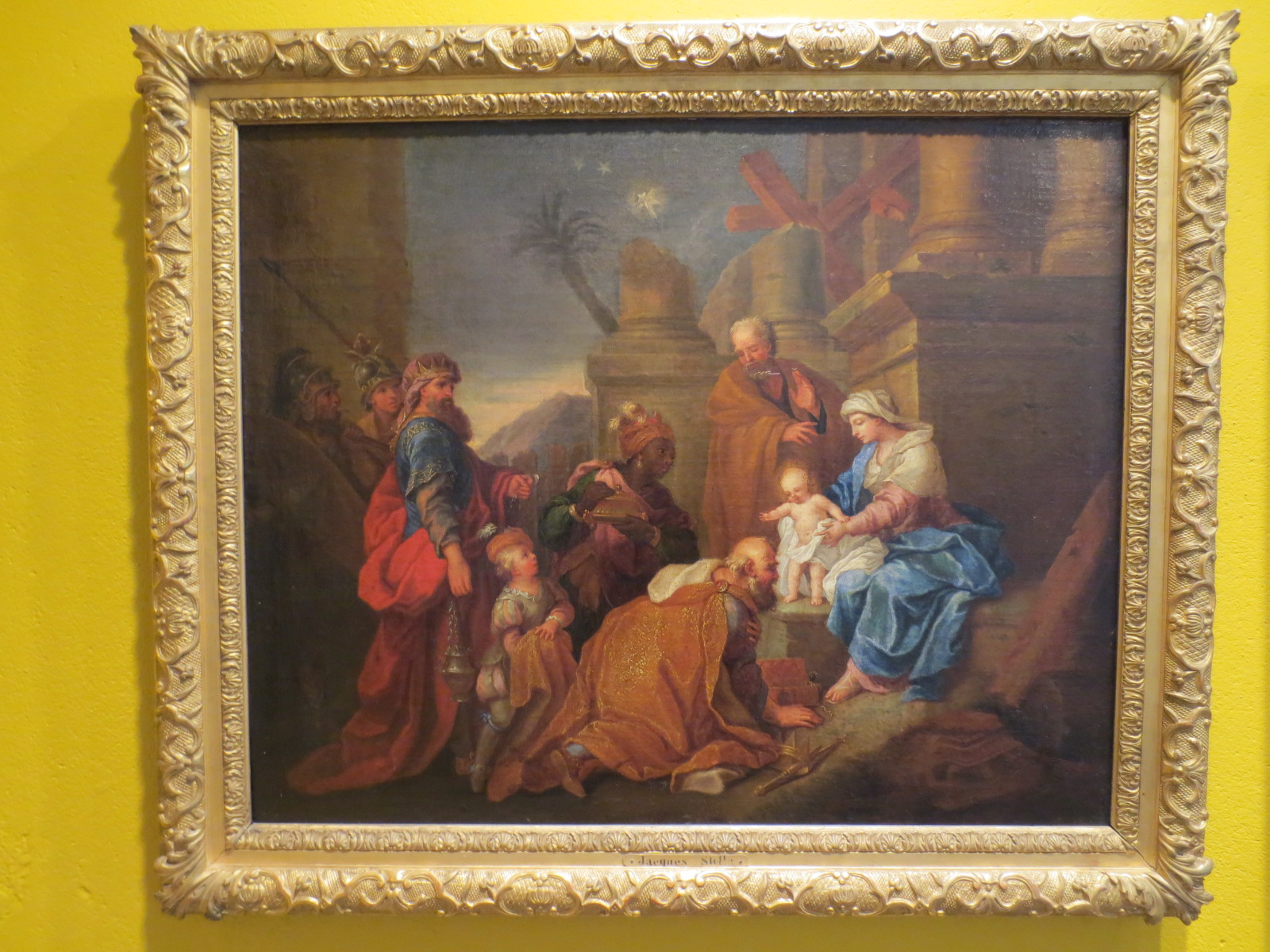 L'adoration des Mages, vers 1720, huile sur toile attribuée à Joseph Christophe, musée des beaux arts de Dole